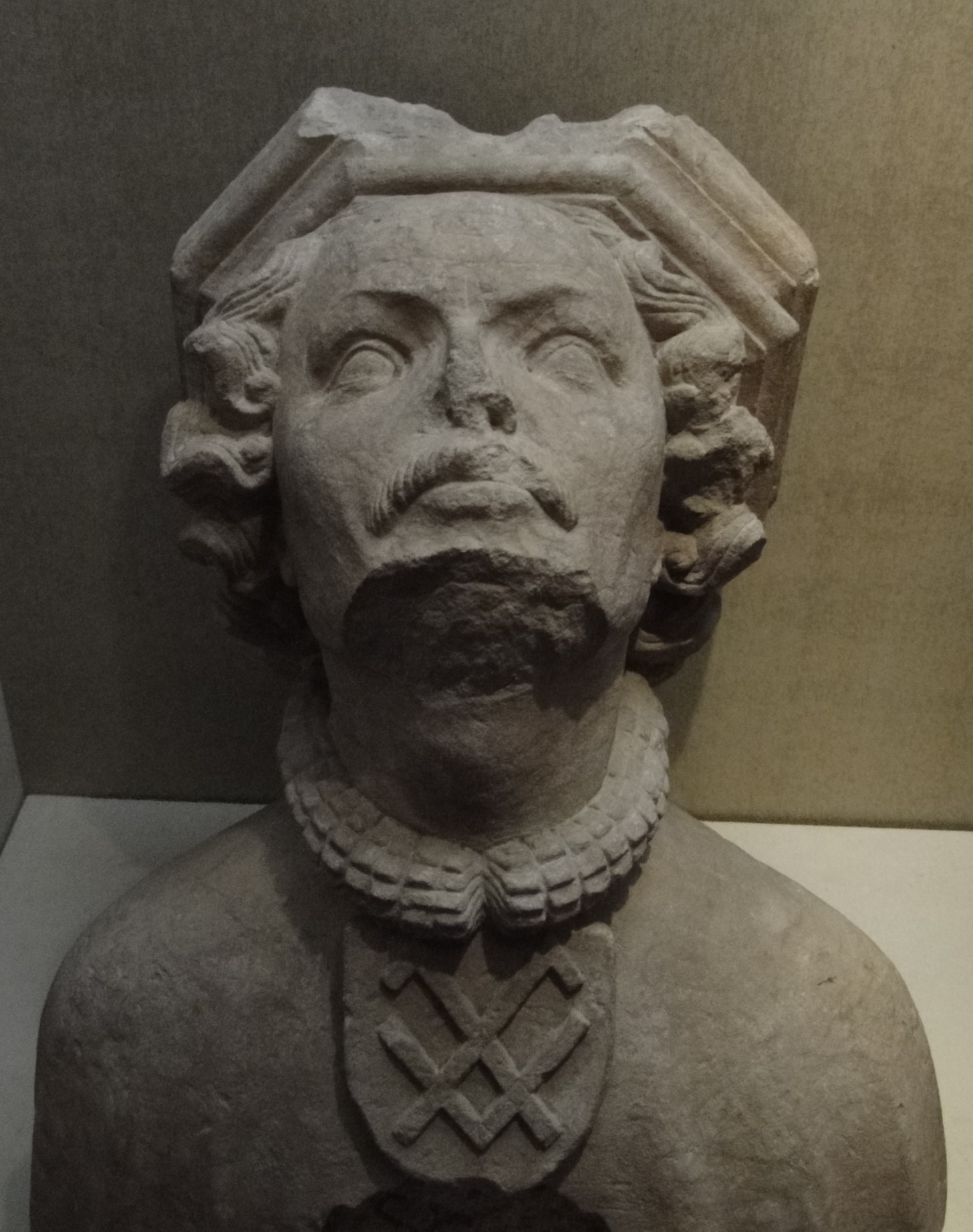 Konsolbüste (Lorenz Busmann) der Busmannkapelle der Sophienkirche in Dresden, derzeit im Stadtmuseum (Fotografie mit Fotoerlaubnis)